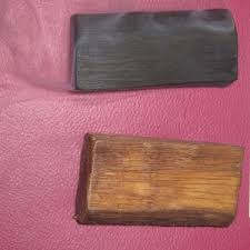 Kayu Ajaib